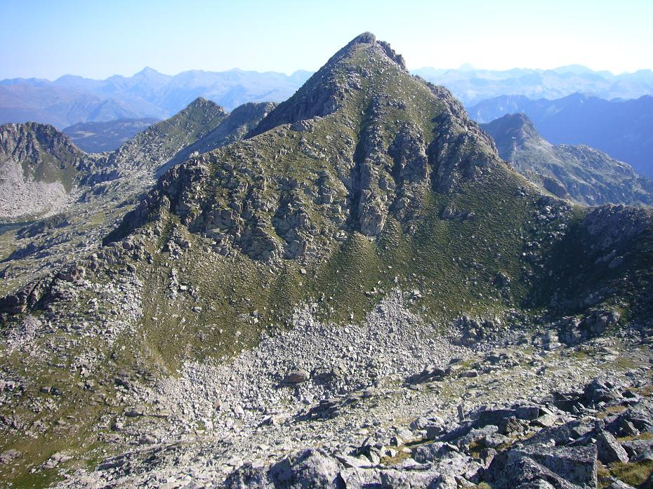 TTuc del Port de Caldes i Coll de Travessani, vistos des del Pic de Travessani; la Vall de Boí, Alta Ribagorça, Catalunya